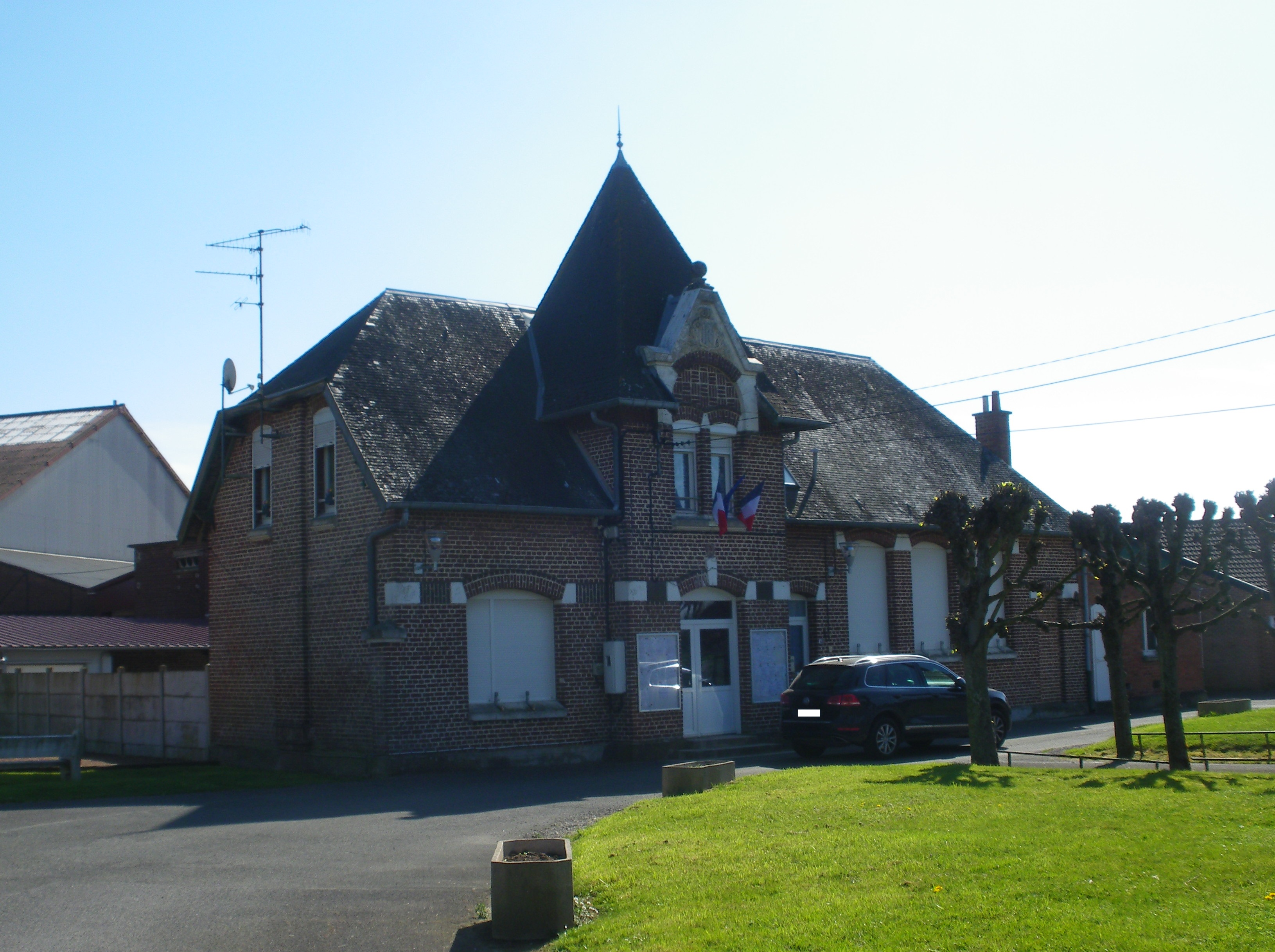 Vue de la mairie de Gomiécourt.